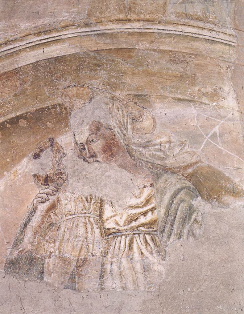 Eve